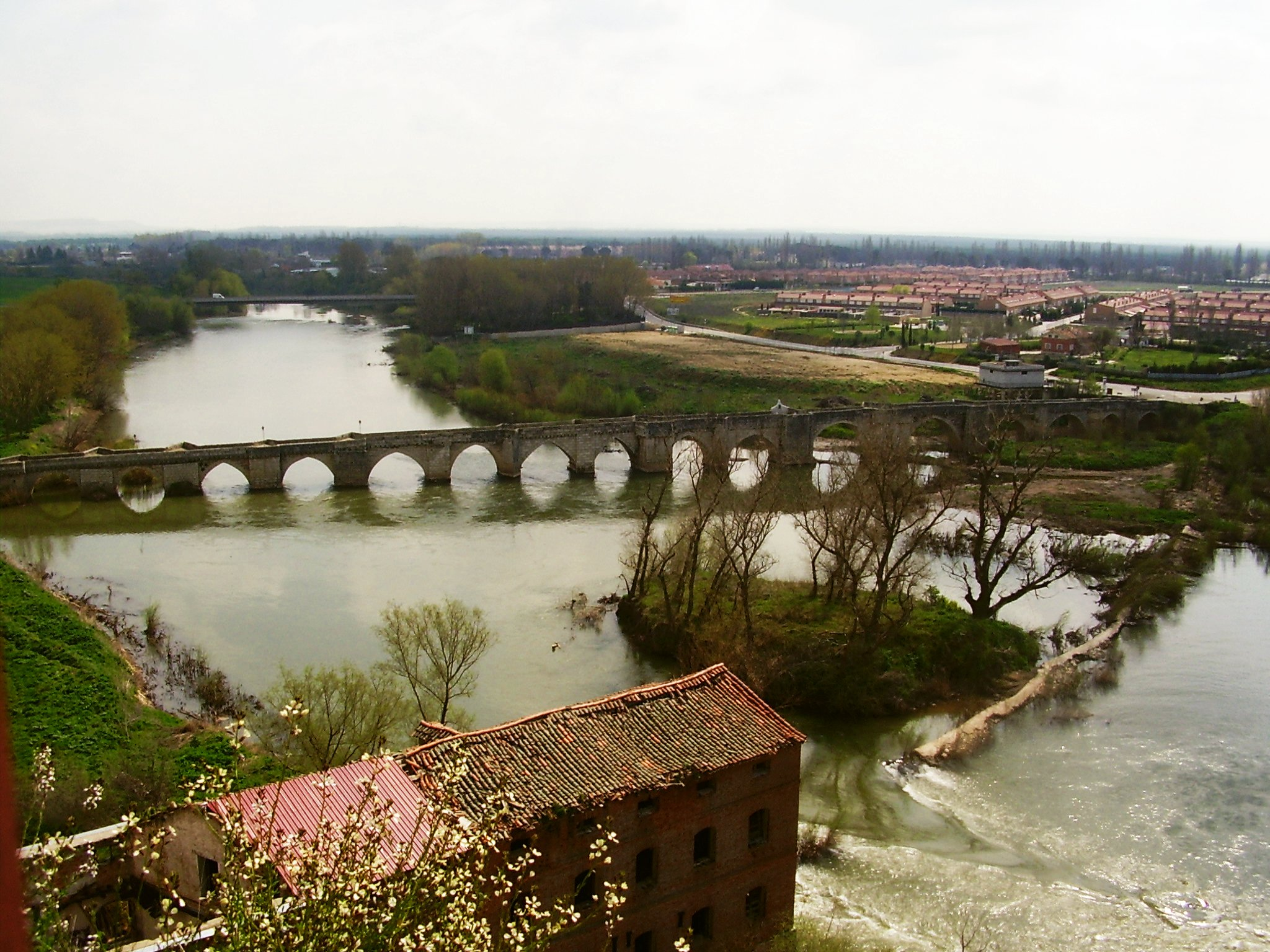 Vista del rio y el puente medieval del siglo XII desde el mirador